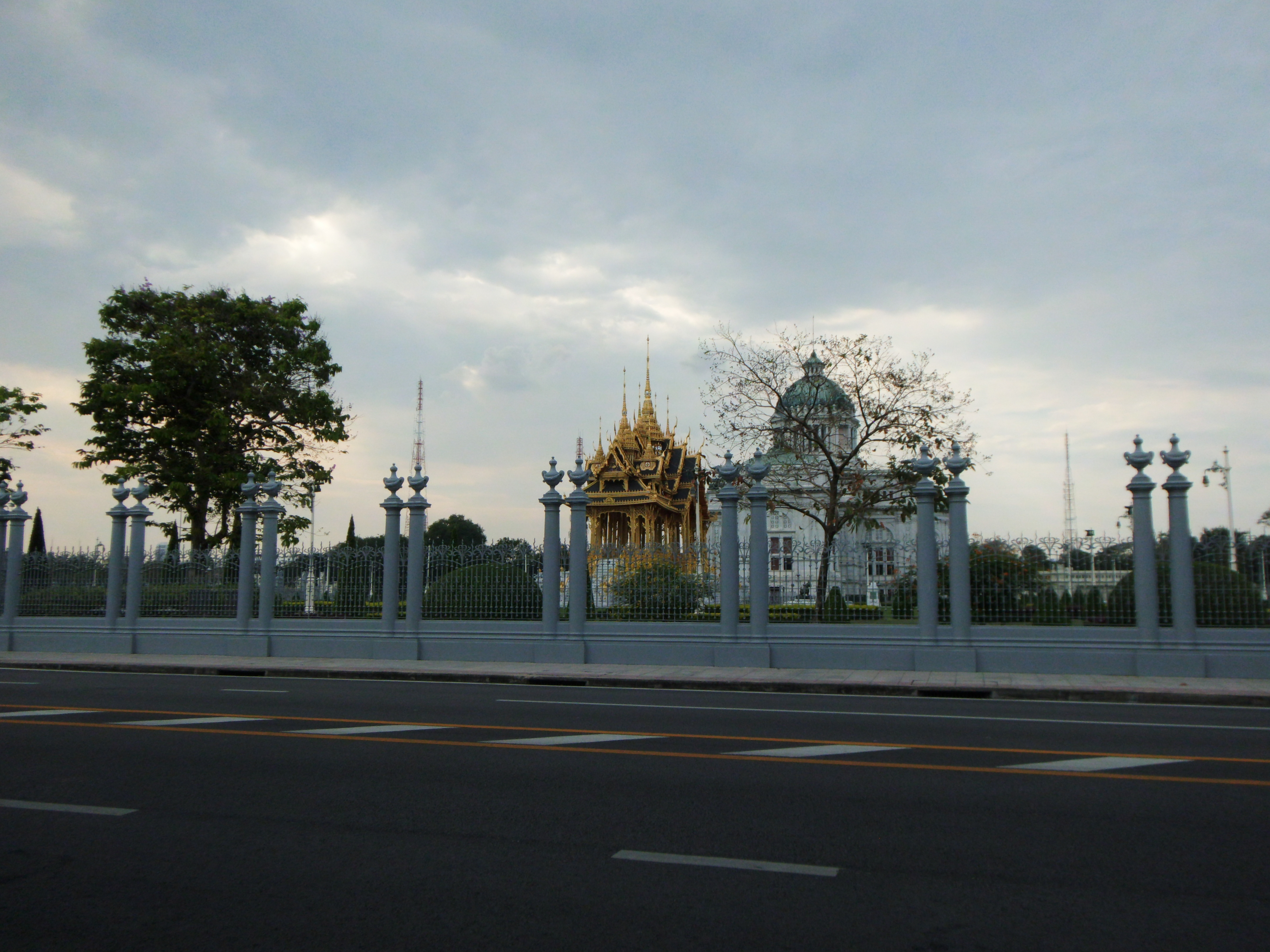 พระที่นั่งอนันตสมาคม